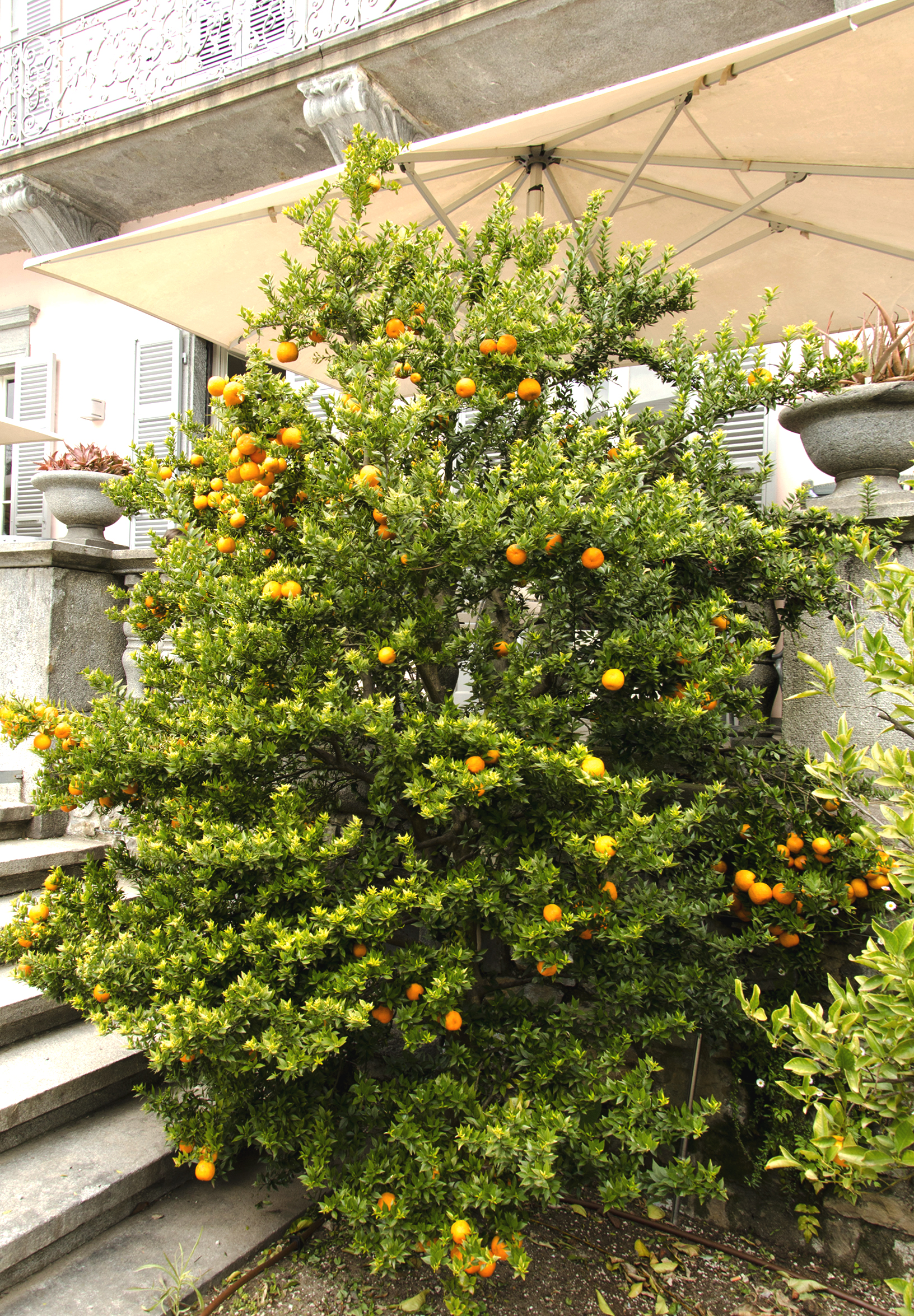 Citrus myrtifolia - Isole di Brissago - Progetto Parco Nazionale del Locarnese